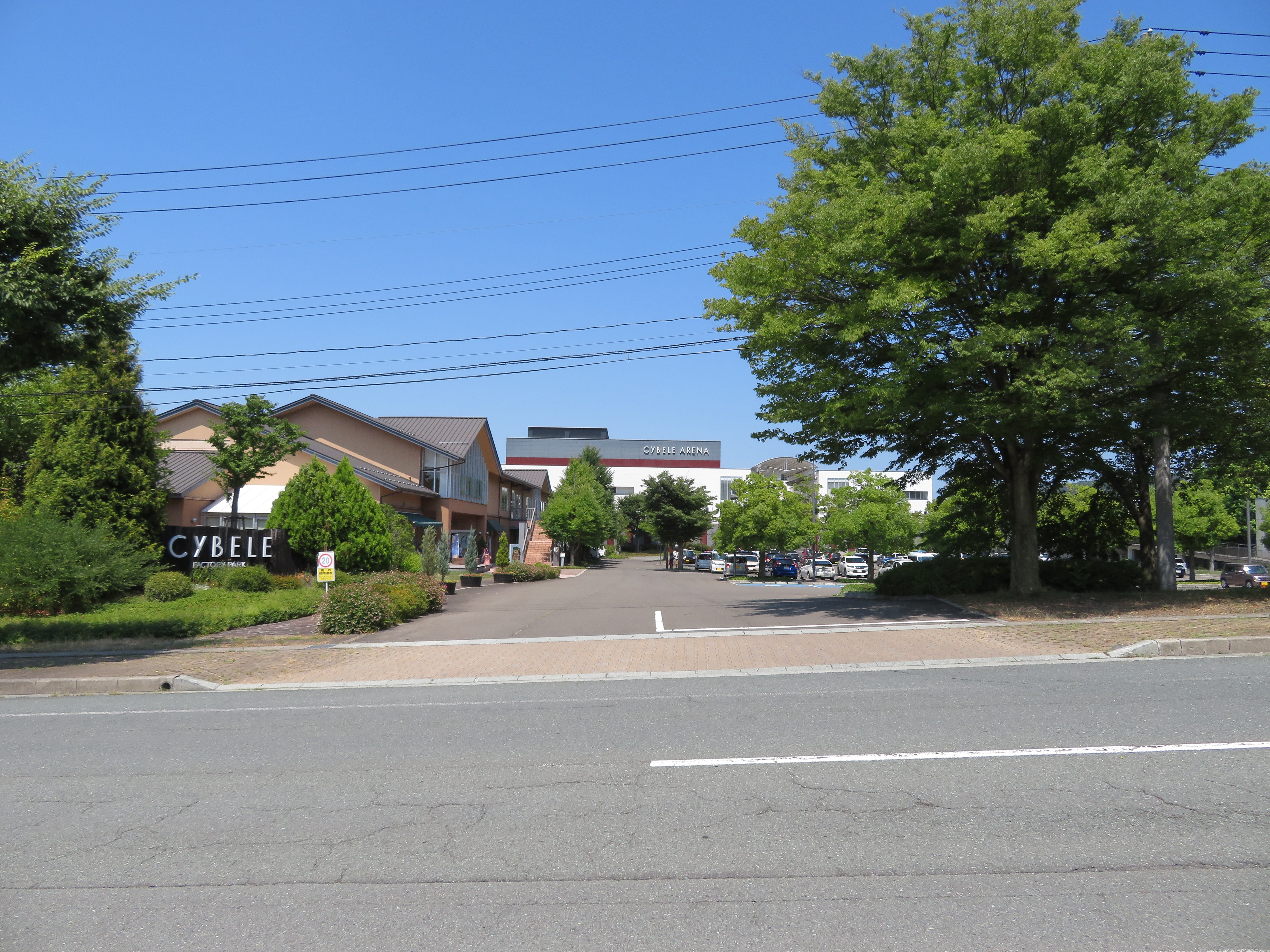 山形市に所在する株式会社シベール Canon PowerShot SX720 HS